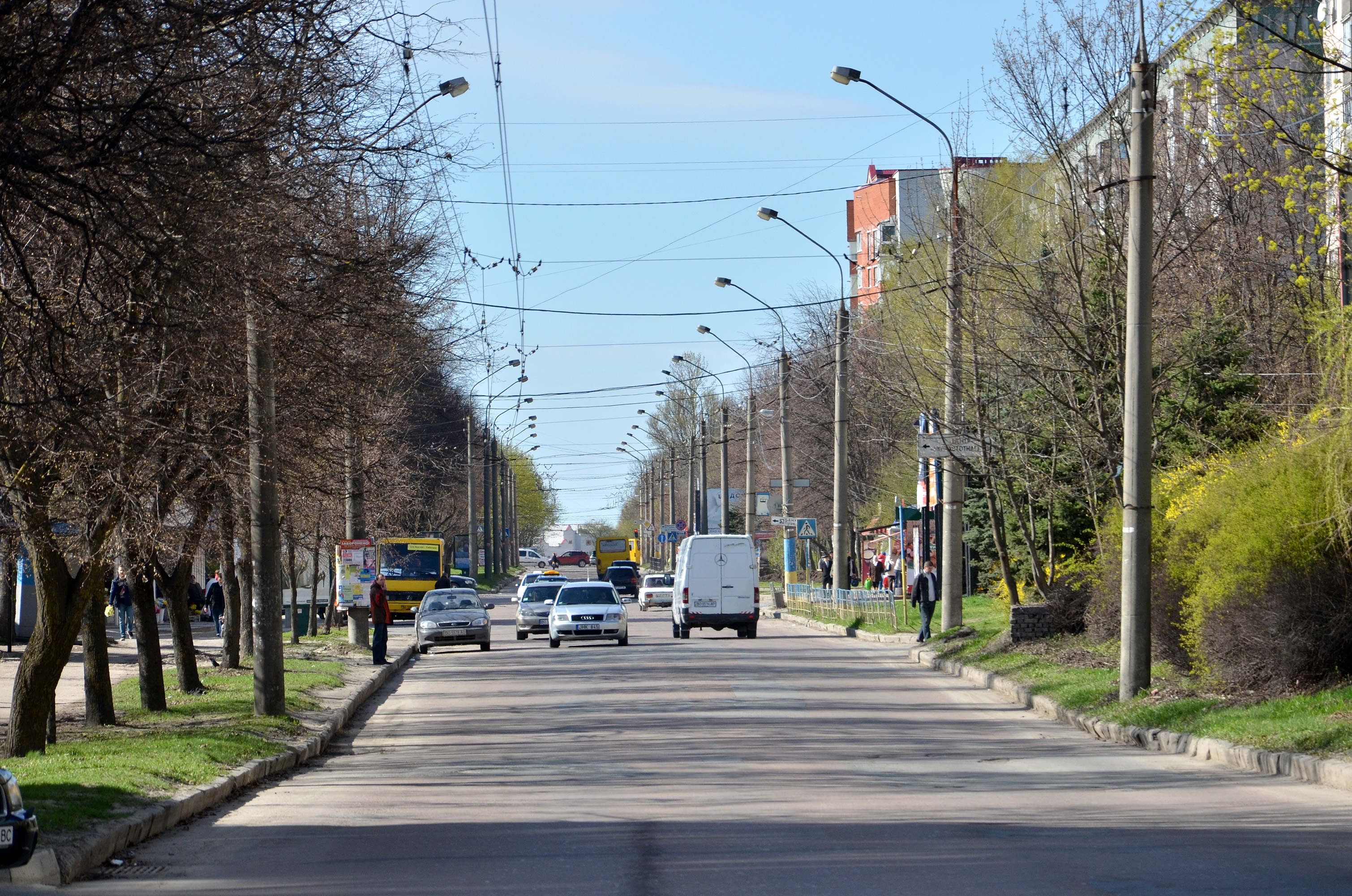 Вулиця Київська в Тернополі.